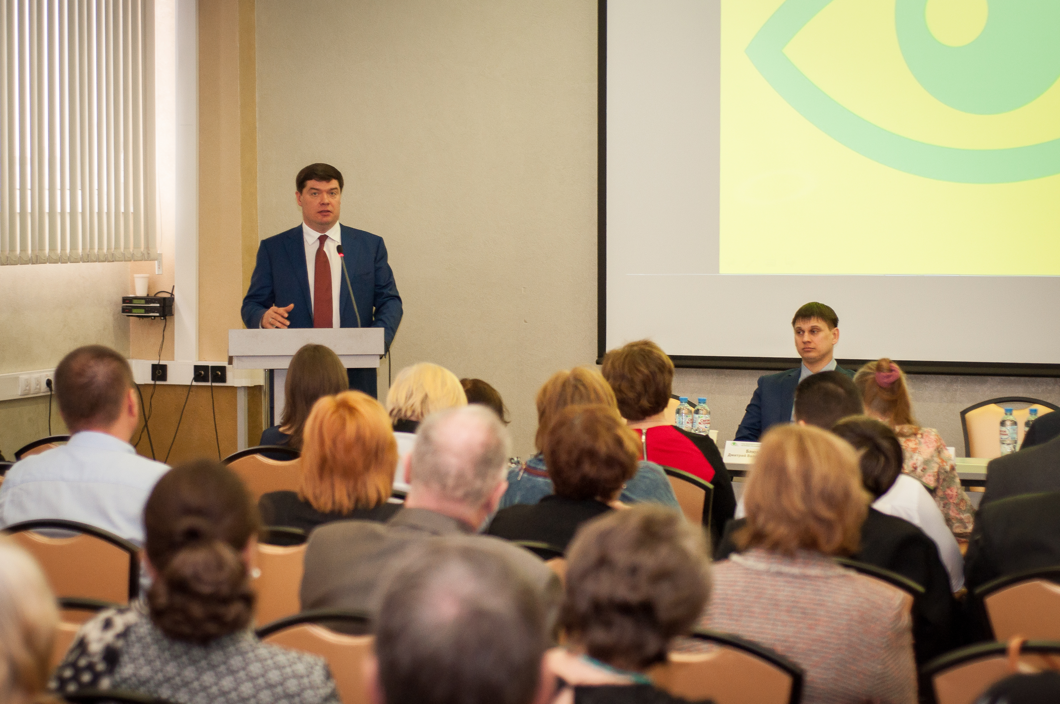 Съезд Общероссийской общественной организации «Всероссийское общество слабовидящих»